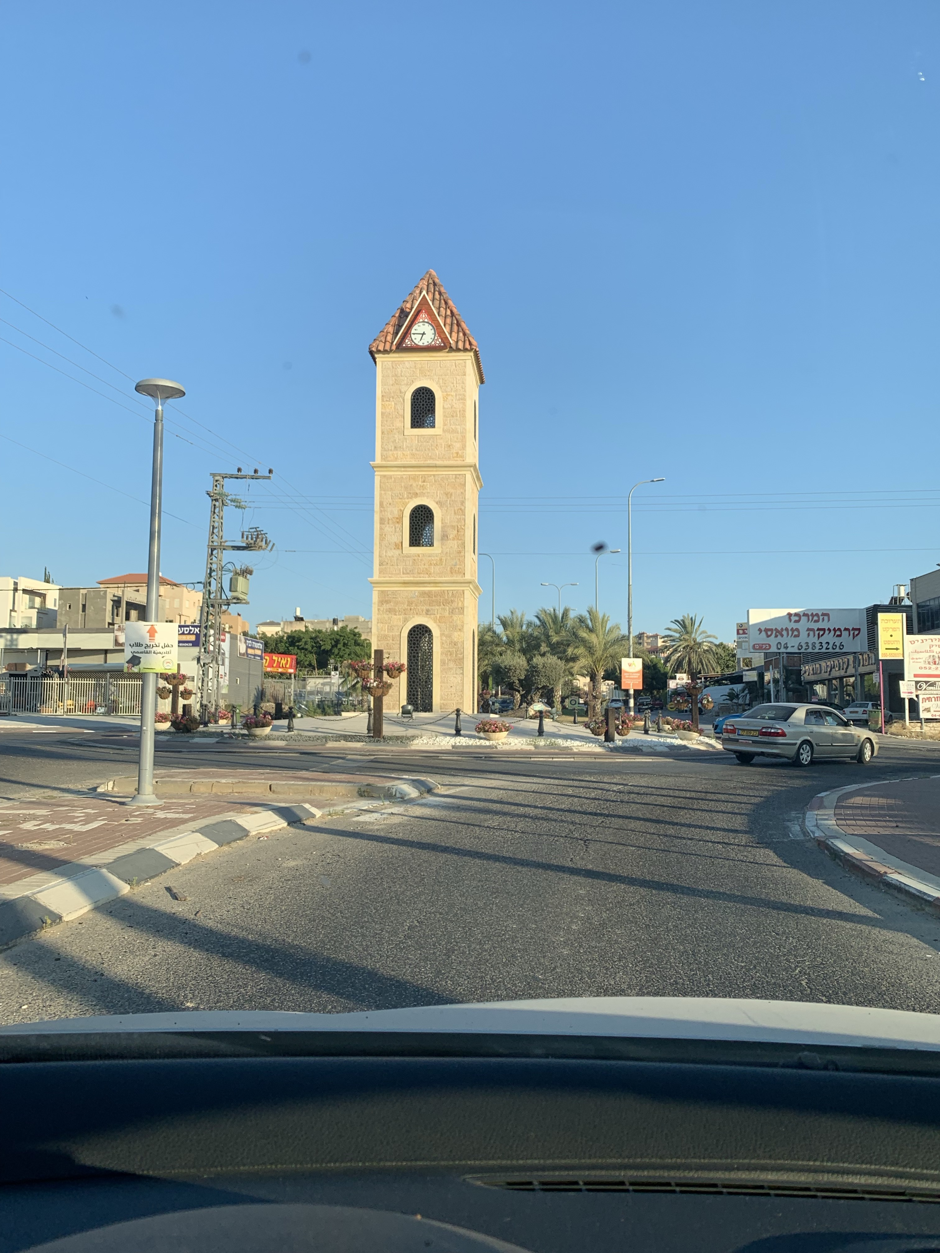 مدخل مدينة باقة الغربية الشمالي والمنارة